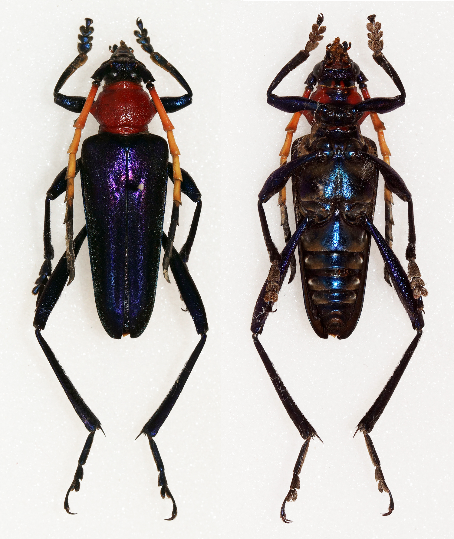 Niisato,2001 Sex: ? Data: 10-2013 - Panngia - Maros - South Sulawesi Size: 28mm